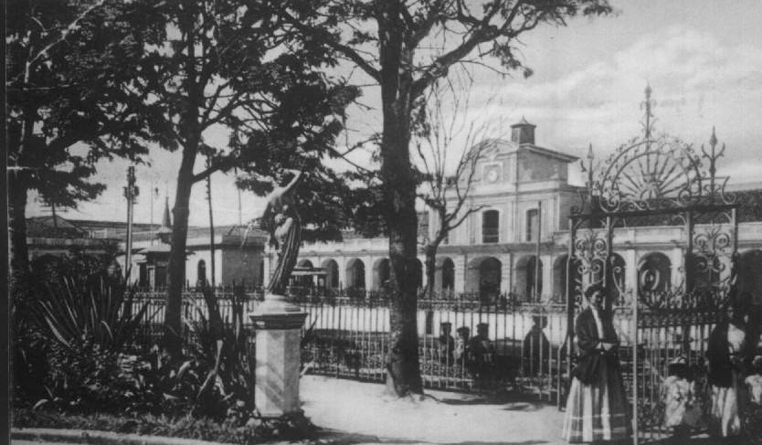 Parque Central y Palacio presidencial de Guatemala en 1900.